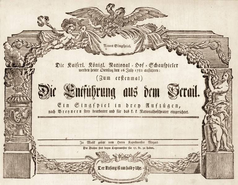 Theaterzettel der Uraufführung des Singspiels "Die Entführung aus dem Serail'" von Mozart, das Kaiser Joseph II. in Auftrag gegeben hatte (Burgtheater Wien, 16. Juli 1782).